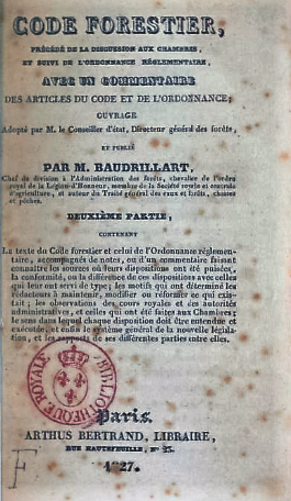 Code forestier précédé de la discussion aux chambres et suivi de l'ordonnance réglementaire